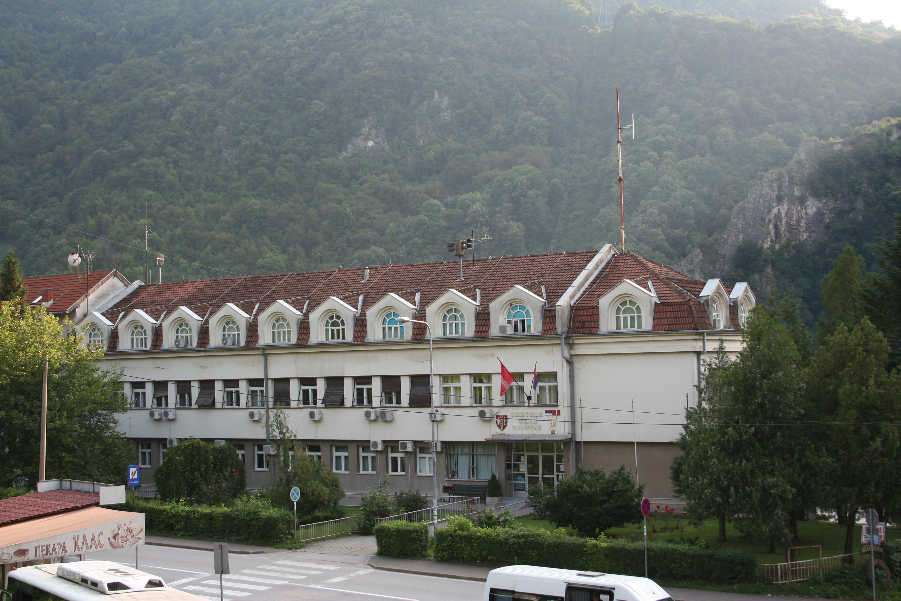 Zgrada SO Mali Zvornik